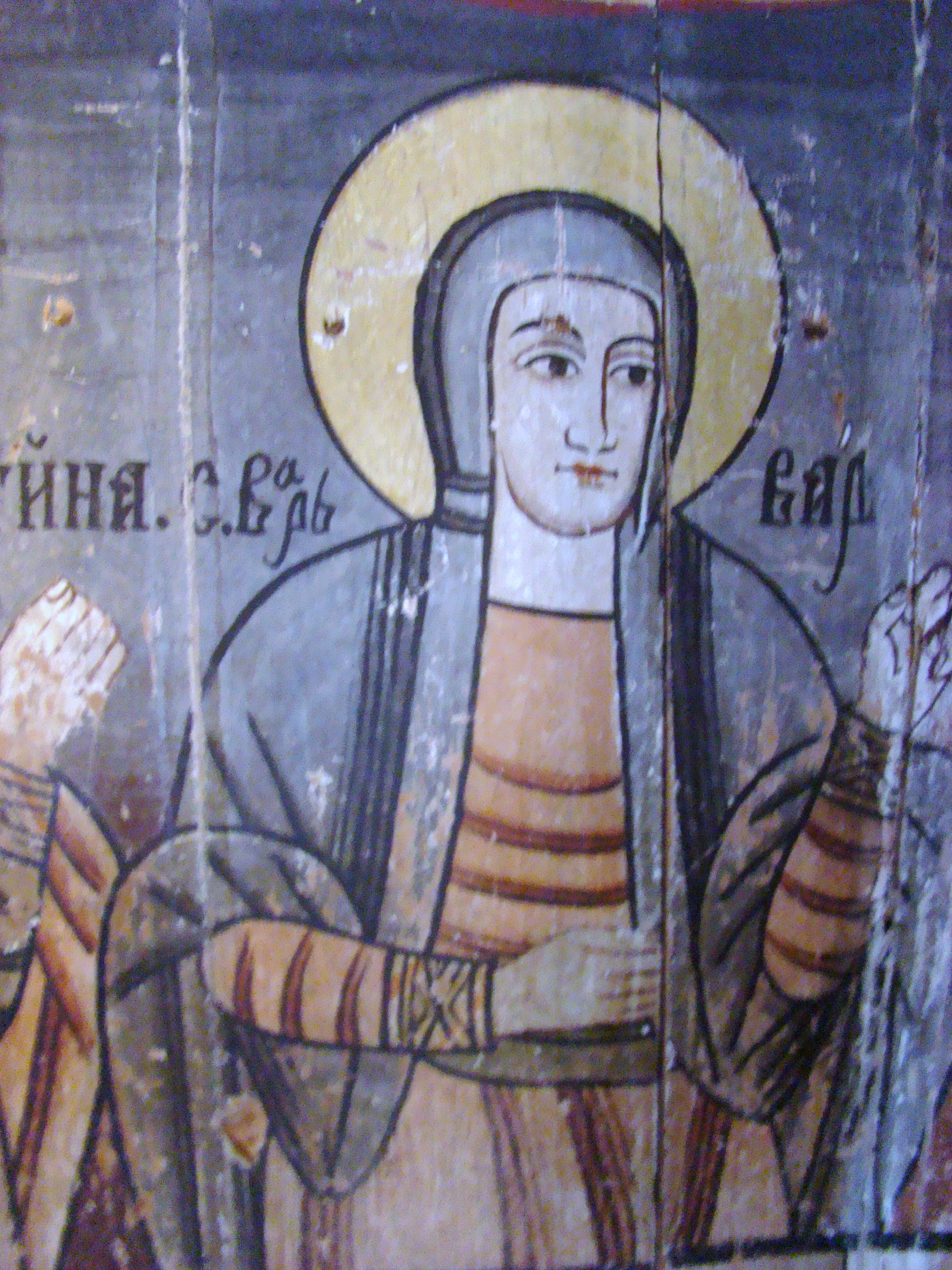 Urișiu de Jos, Mureș